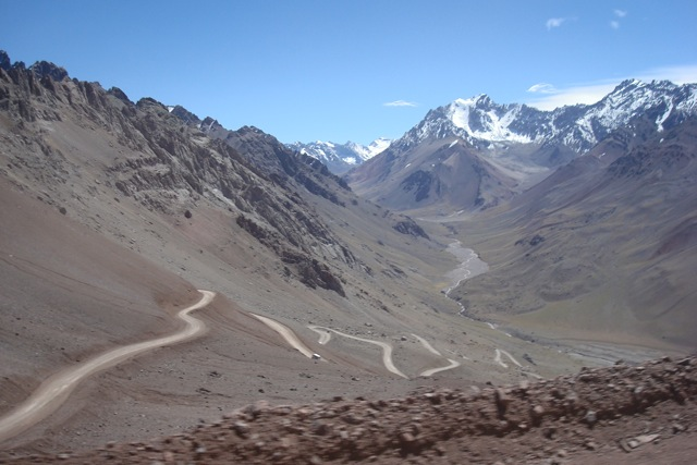 Paso de la Cumbre (Argentina)